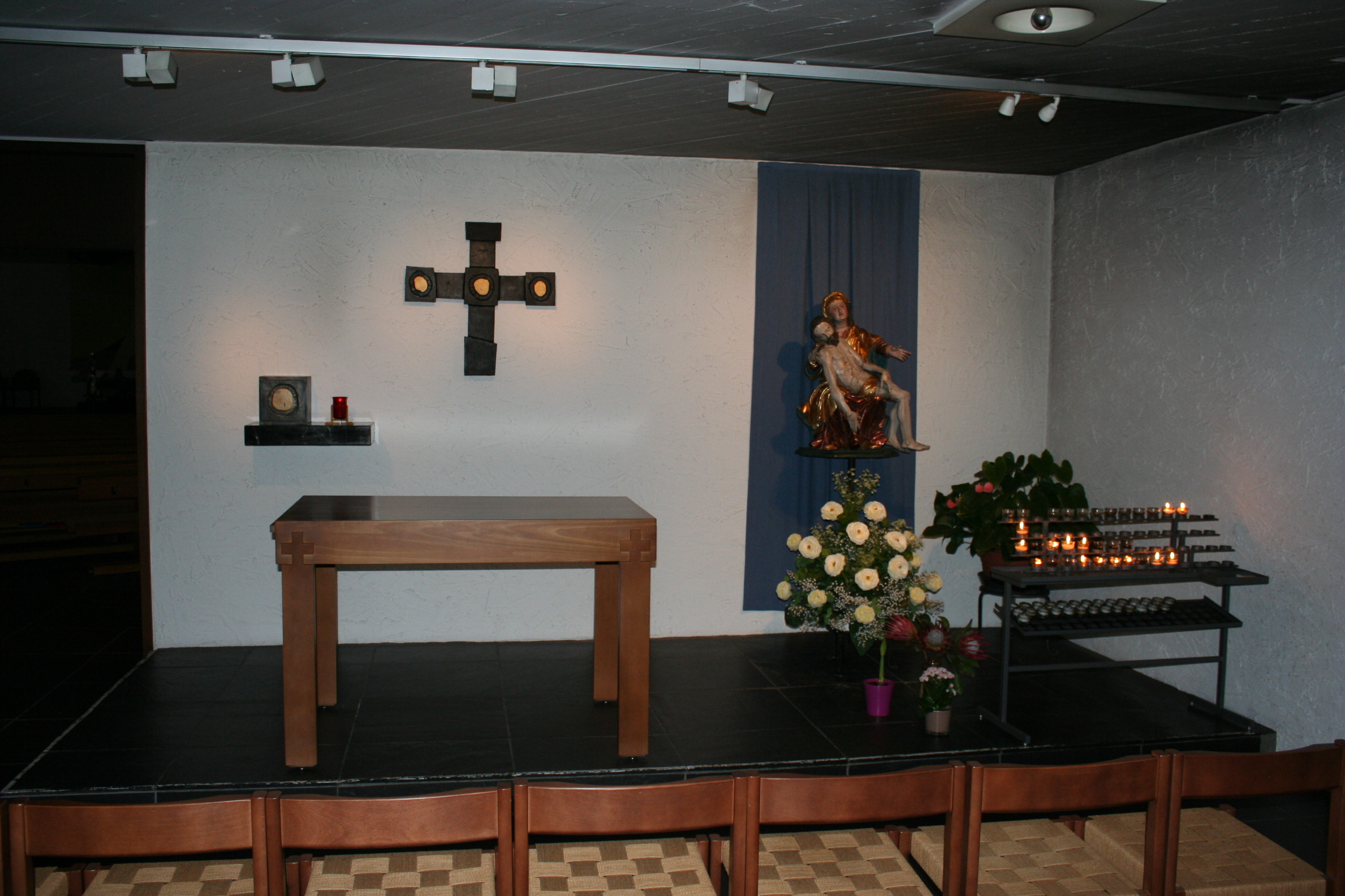 Römisch-katholische Pfarrkirche St. Mauritius Oberengstringen, Werktagskapelle